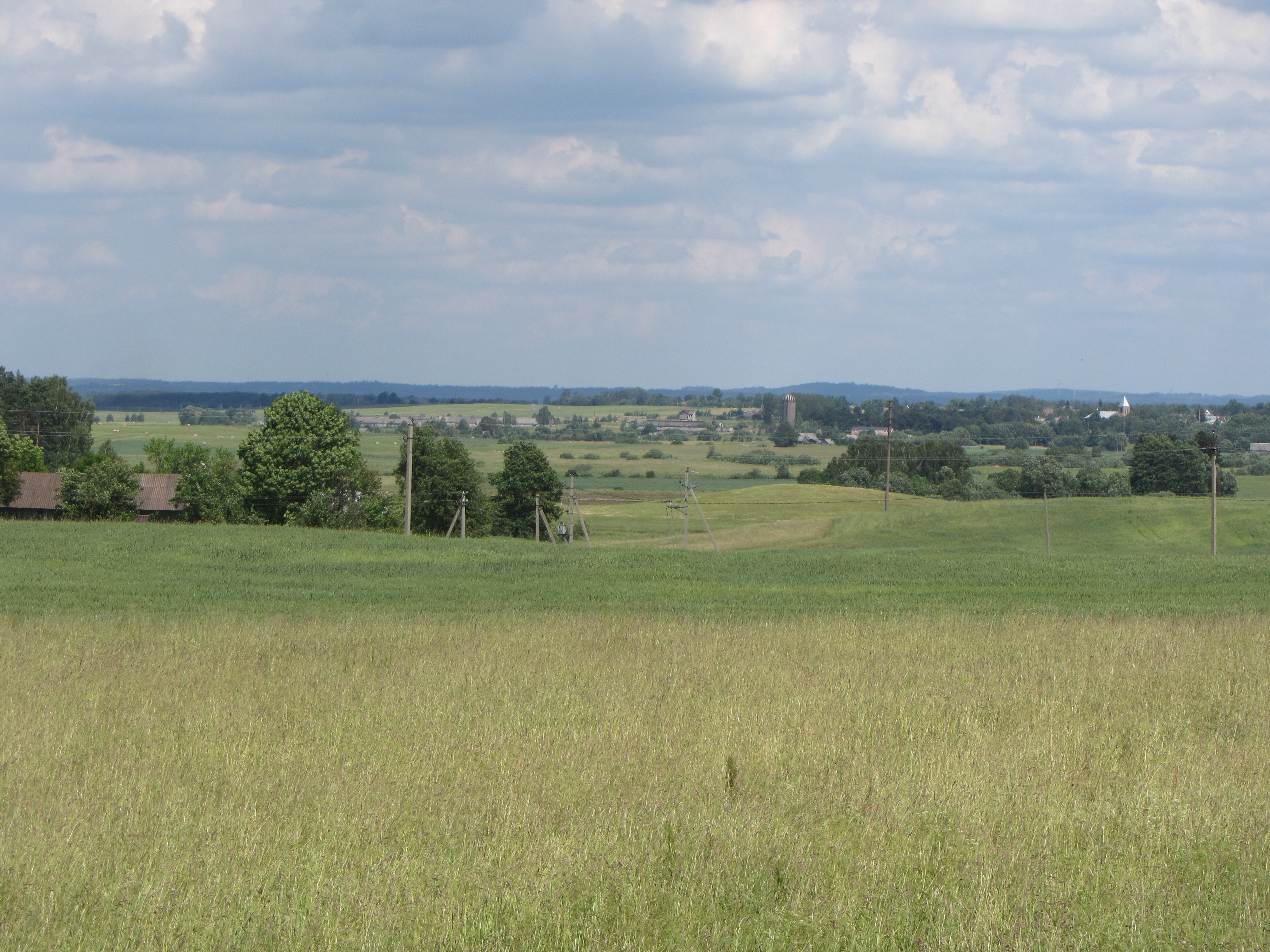 Punios sen., Lithuania